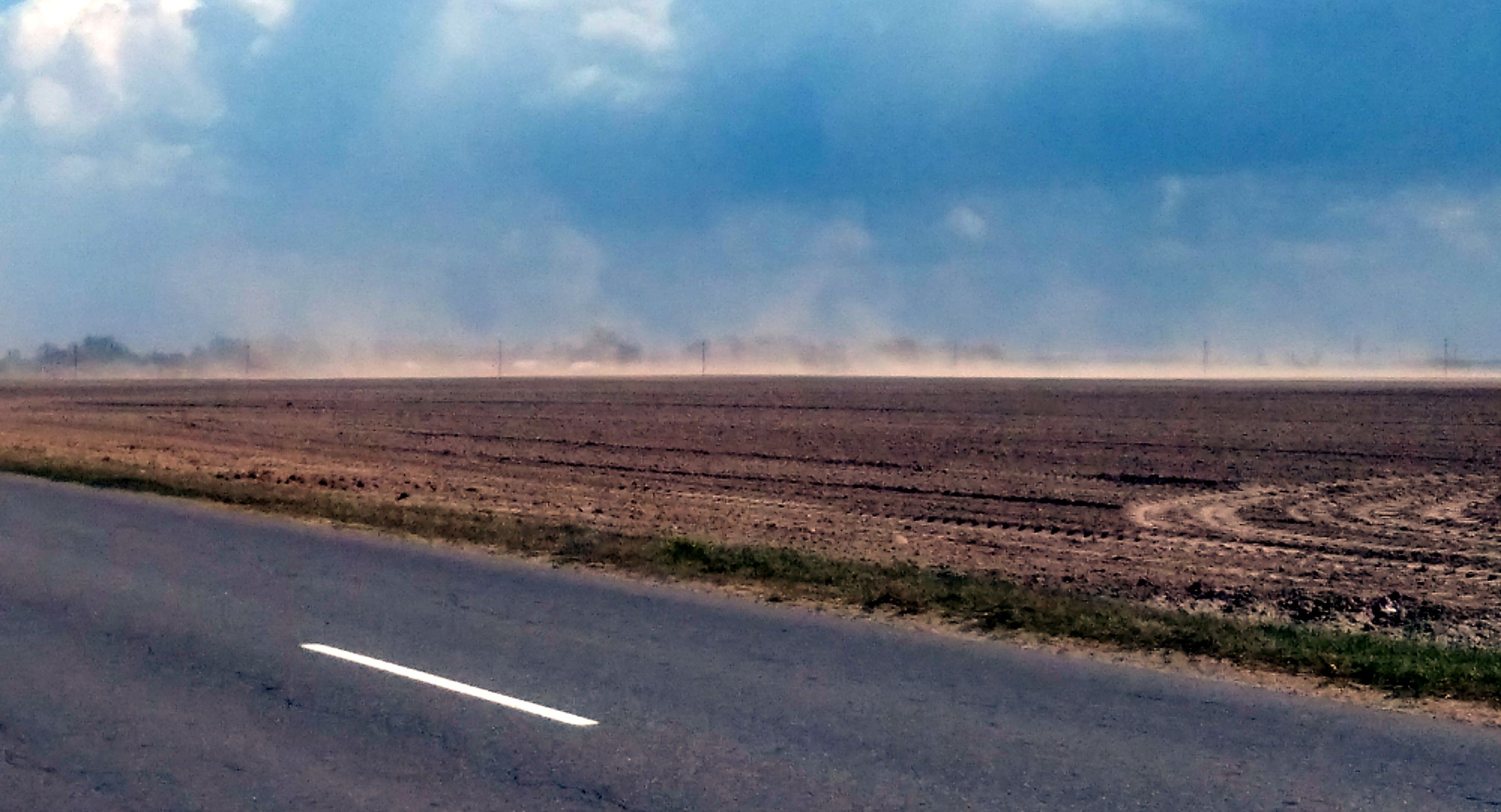 Пясчаная завіруха ў раёне Застружжа, Іванаўскі Раён, Брэская вобласць, Беларусь, красавік, 2020